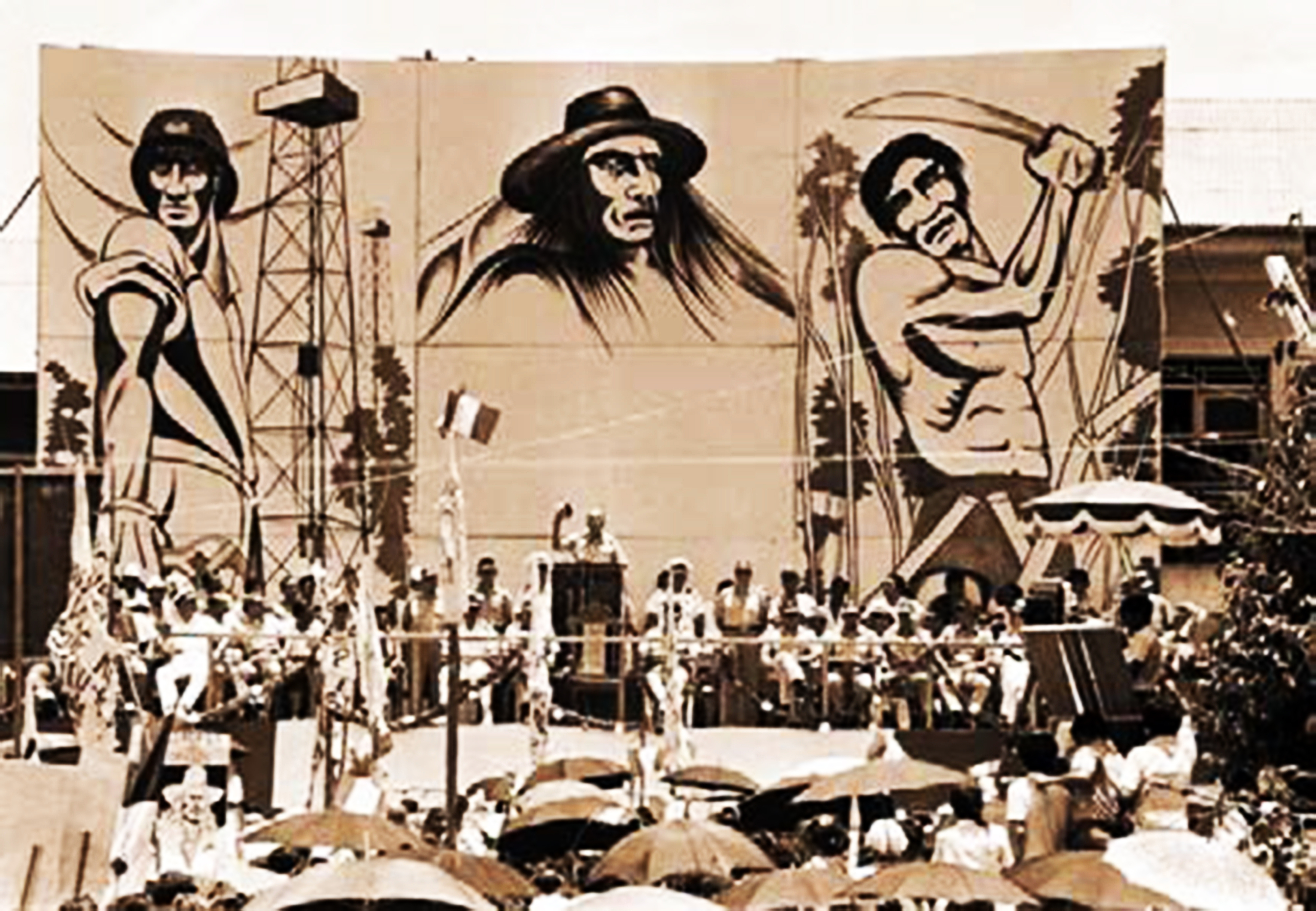 Gobierno Revolucionario de la Fuerza Armada